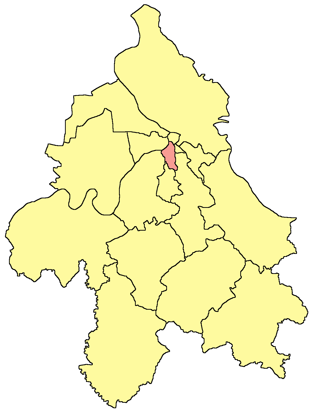 Belgrade municipality map